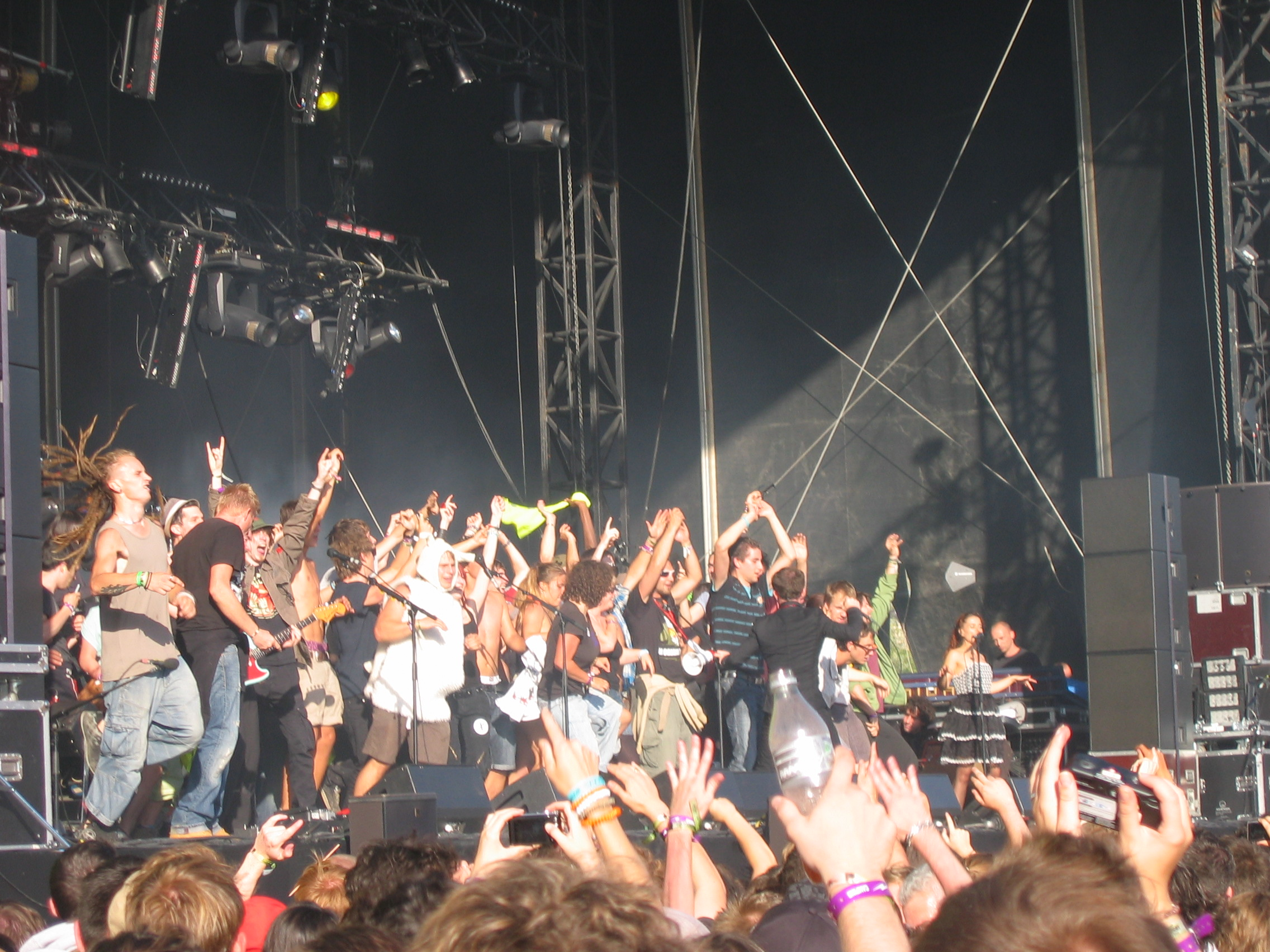 Le chanteur de Dionysos fait monter des festivaliers sur scène et les fait danser avec le groupe